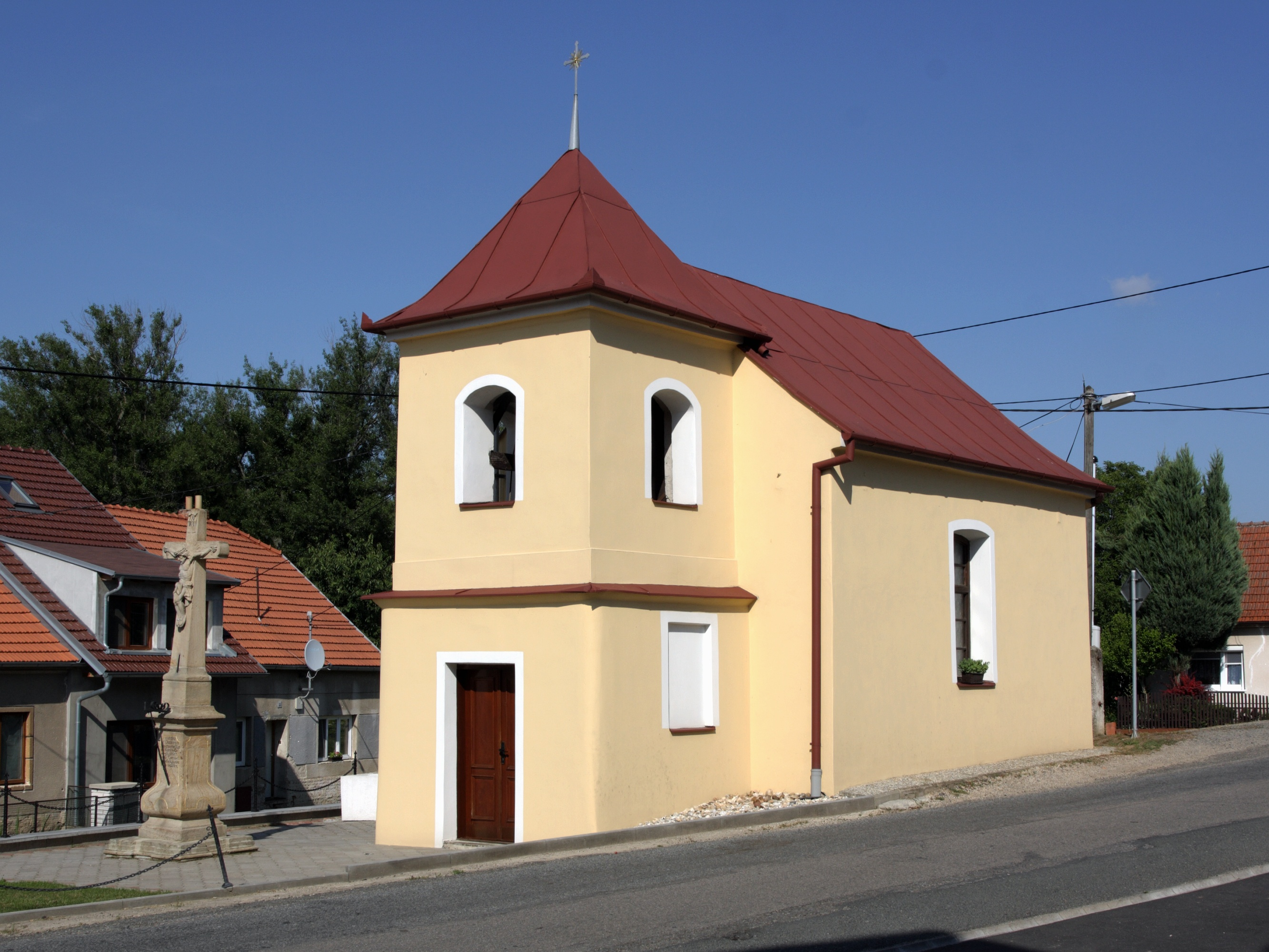 Ledce - kaple Panny Marie Pomocnice.